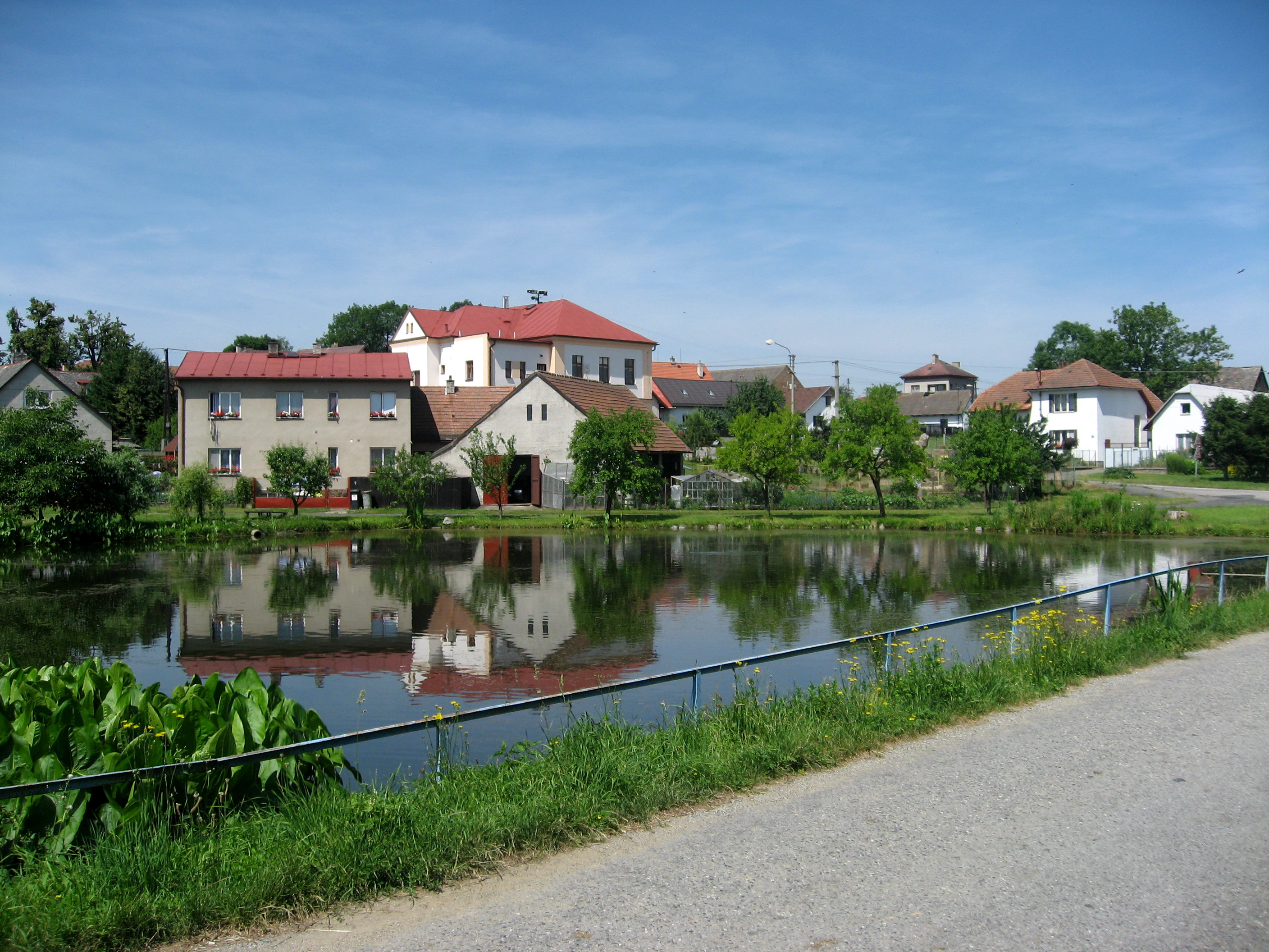 Nová Ves u Světlé